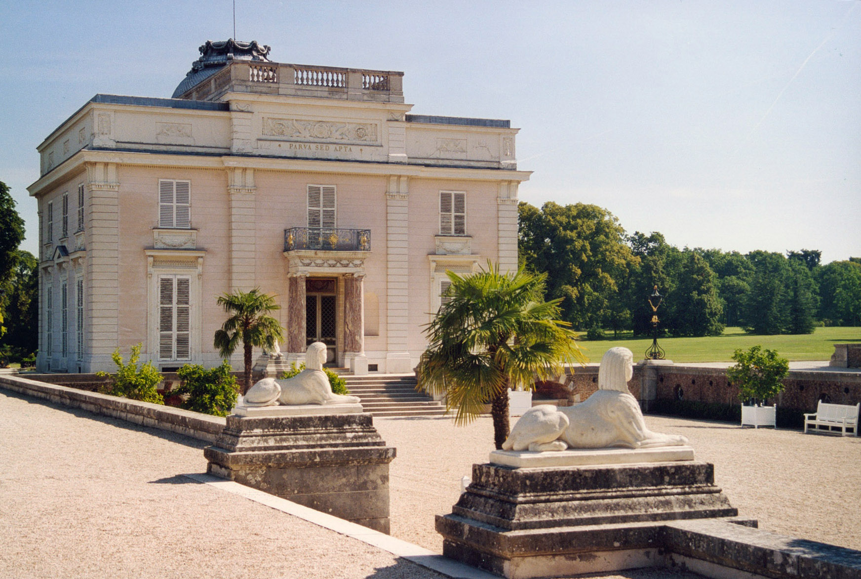 Paris, Parc de Bagatelle